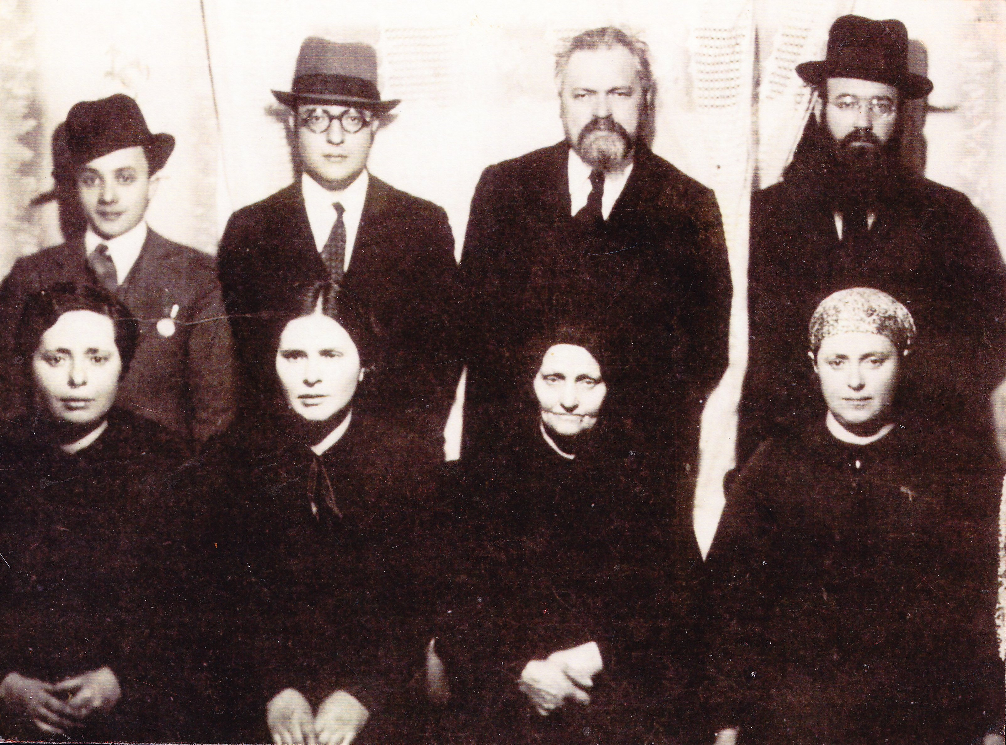 Rabbi Chaim Walkin of olozin with his uncle Meir Bar-Ilan and other family members